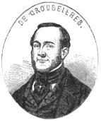 "La Commission de permanence de l'Assemblée nationale". (Détail : "DE CROUSEILHES")